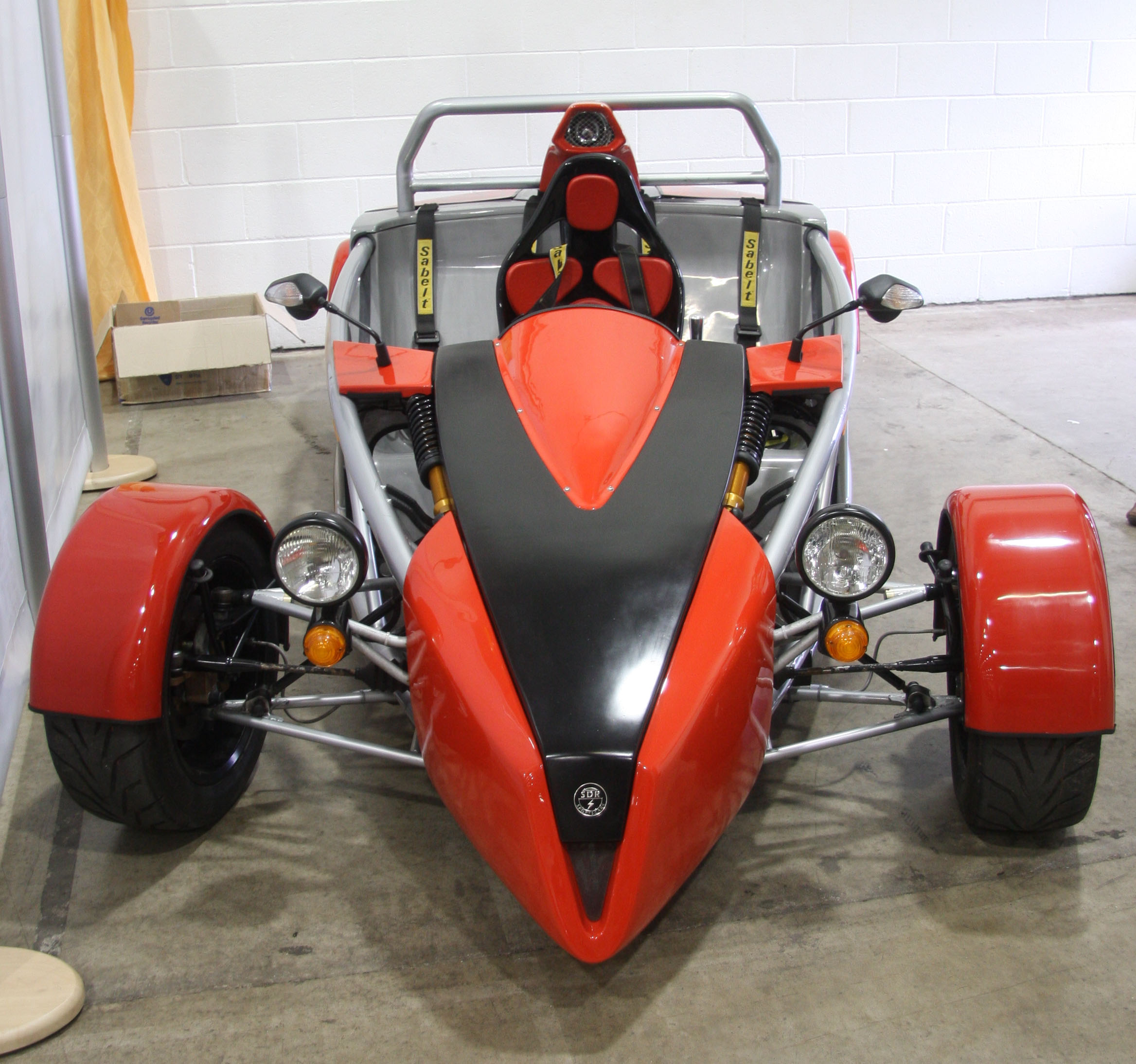 SDR V-Storm